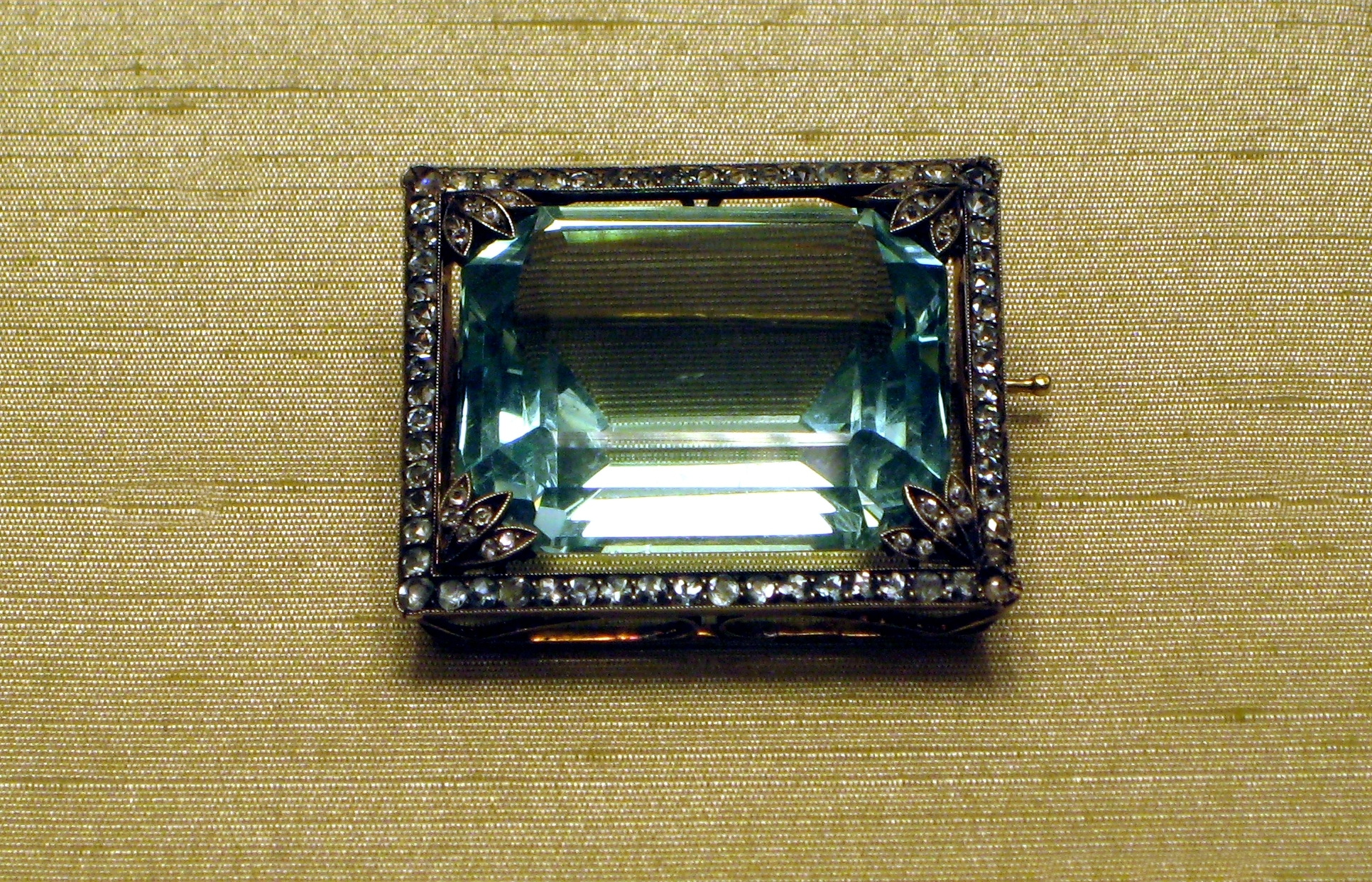 Брошь. СПб, 1908-1917. Фирма Фаберже. Аквамарин, алмазы, топазы, золото, серебро. ГИМ.